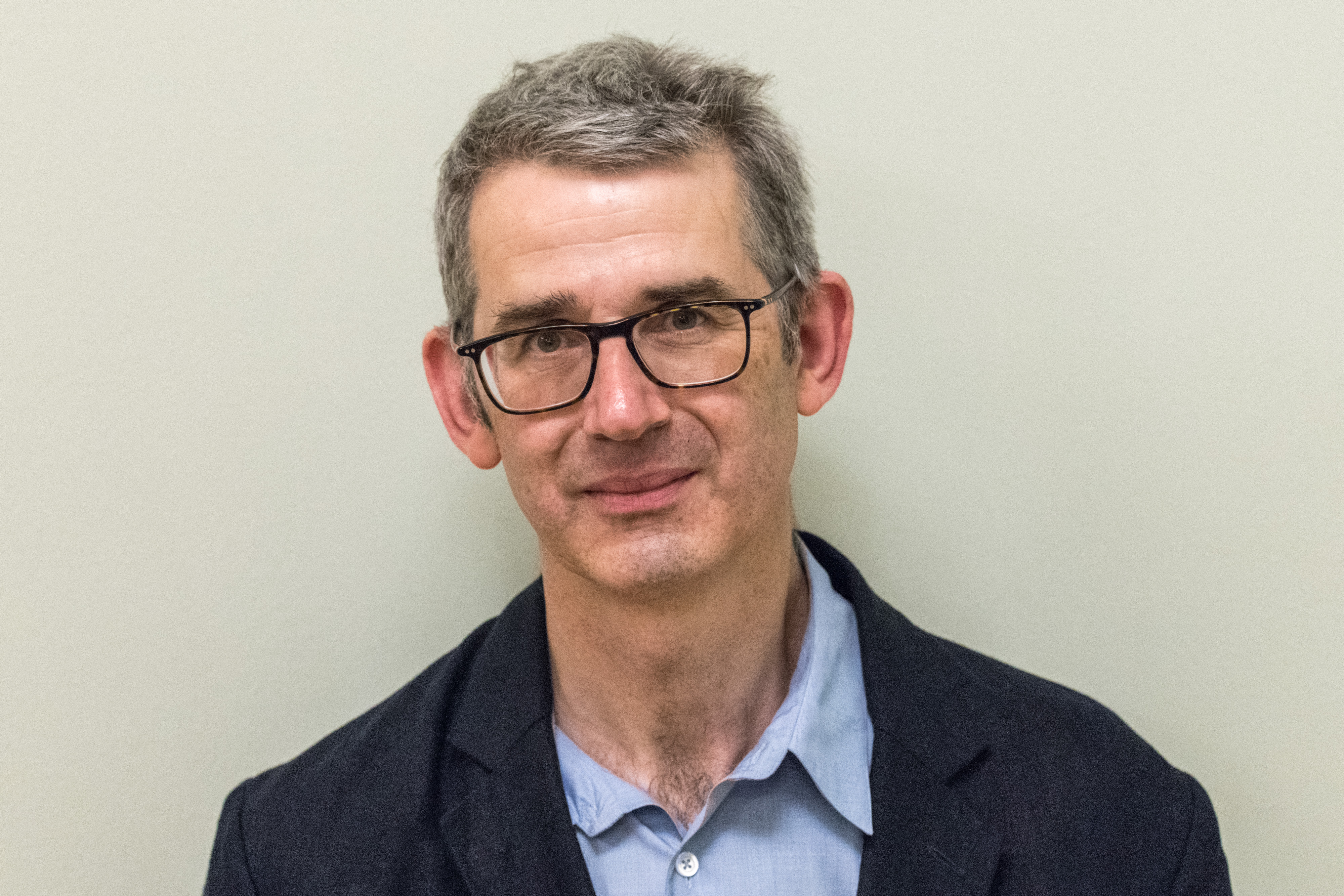 Edmund de Waal bei der Uraufführung des Musicals "Der Hase mit den Bernsteinaugen" am Landestheater Linz